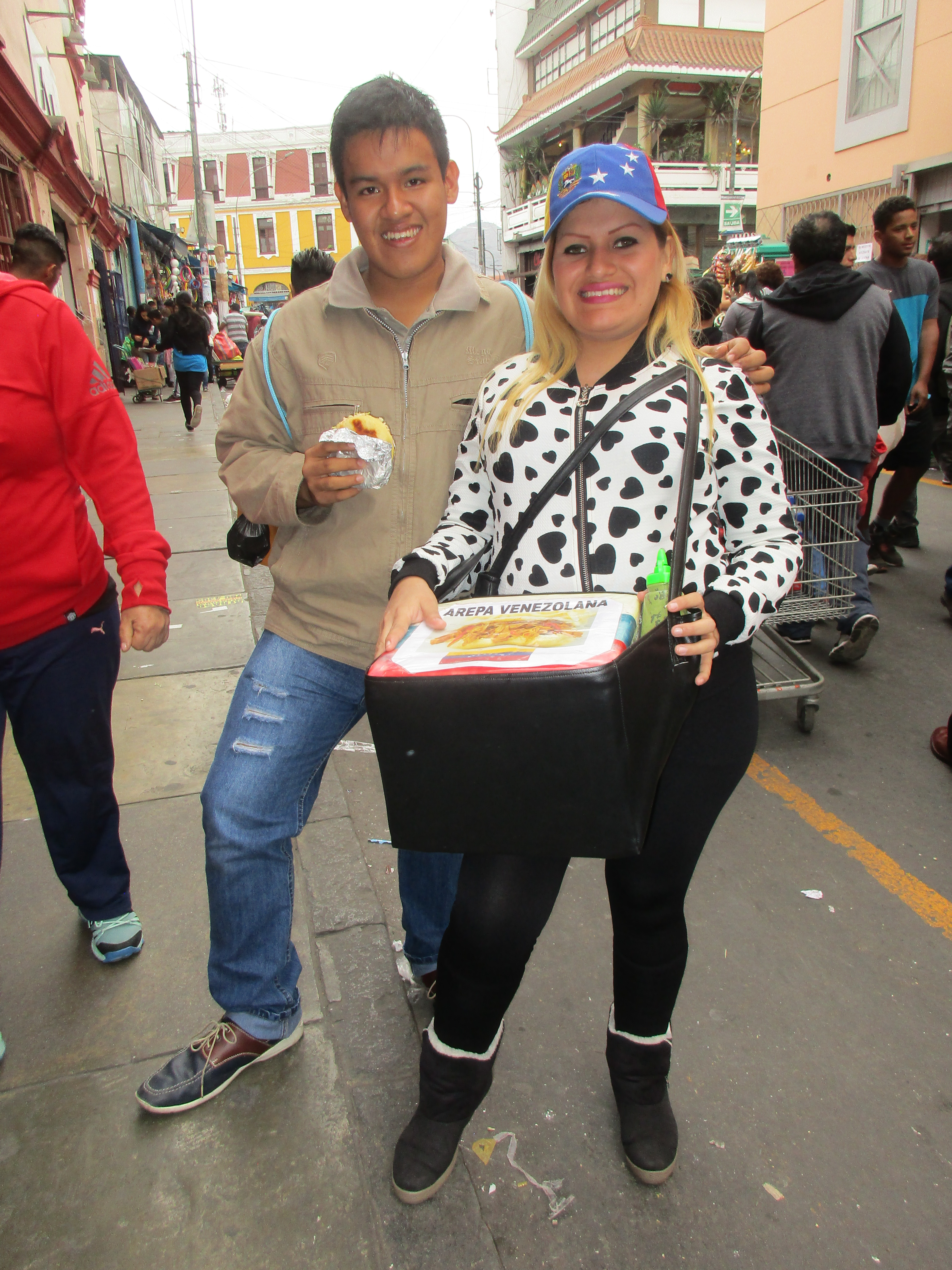 Ciudadano peruano originario de Loreto con inmigrante venezolana originaria de Carabobo en Gamarra, Lima, Perú La ciudadana venezolana que emigro al Perú a raiz de la crisis actual de su país se gana provisionalmente la vida vendiendo arepas.